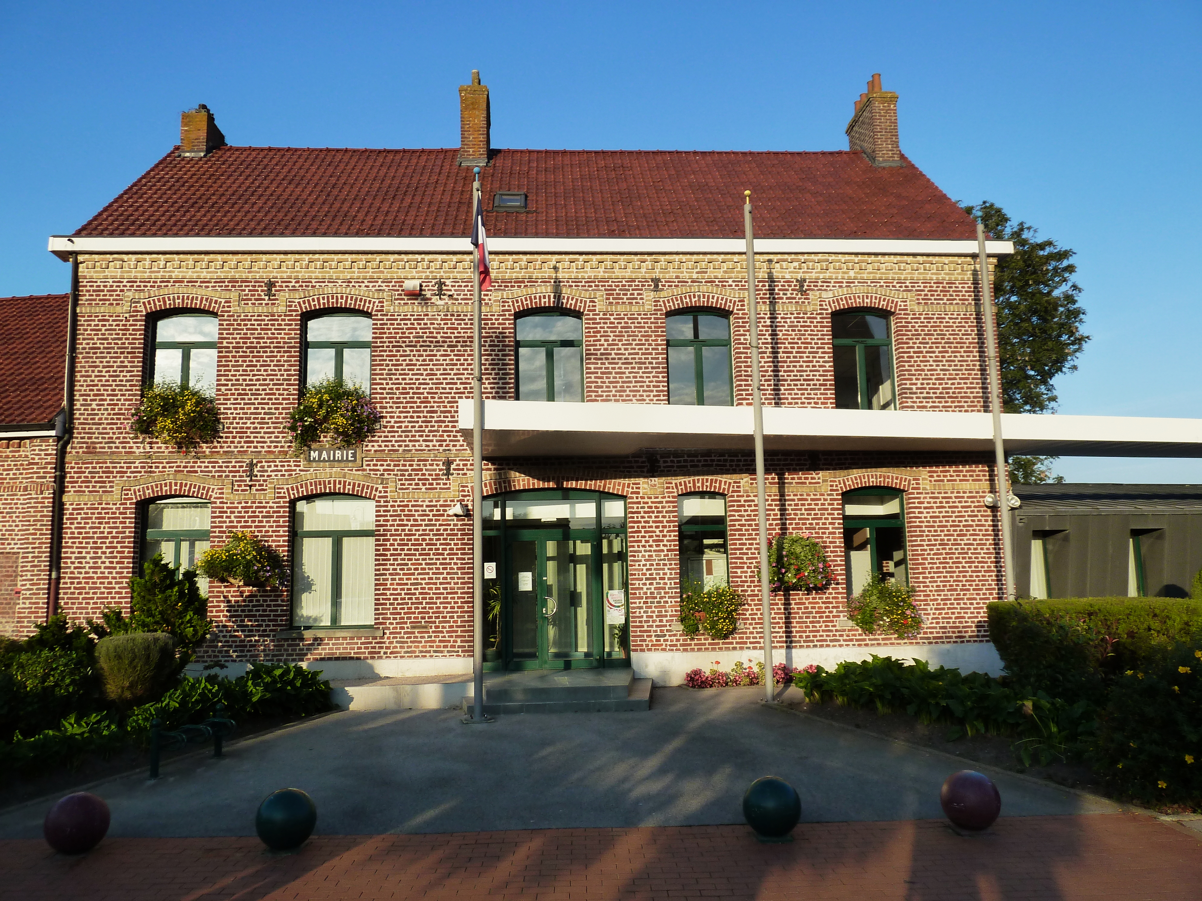 La mairie d' Arnèke dans le Nord Nord-Pas-de-Calais.- France.